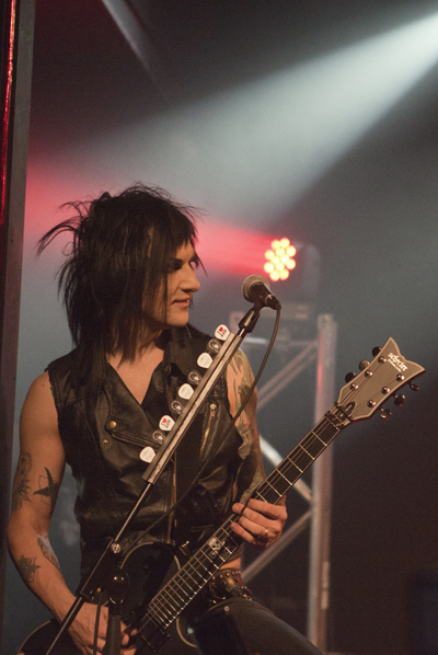 Black Veil Brides en su concierto en Barcelona, España, el 8 de abril de 2013 en el recinto Music Hall. En la imagen: Jinxx.